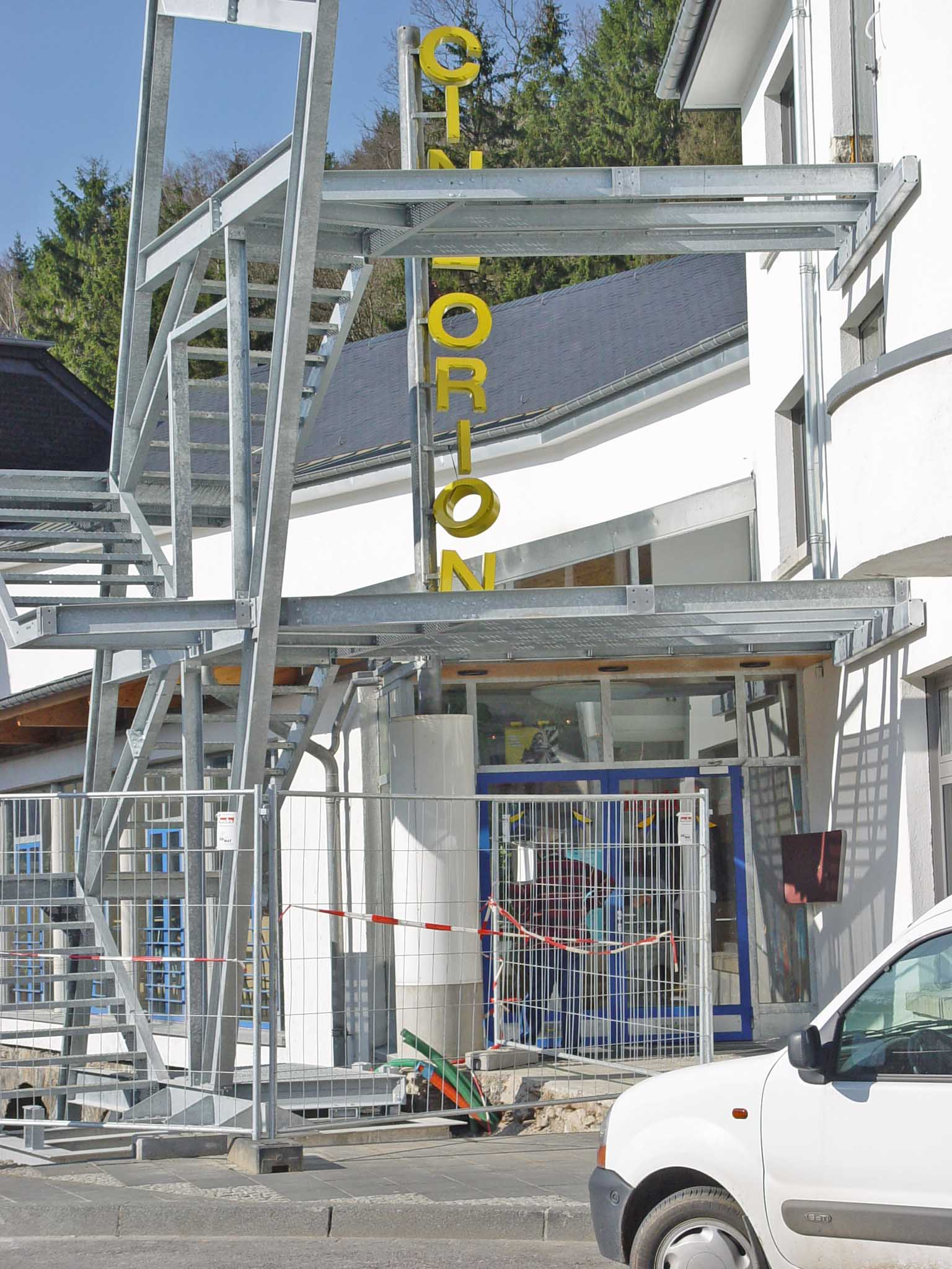 De Kino Orion zu Ëlwen. Kategorie:Lëtzebuerger Kinoen Kategorie:Gemeng Ëlwen